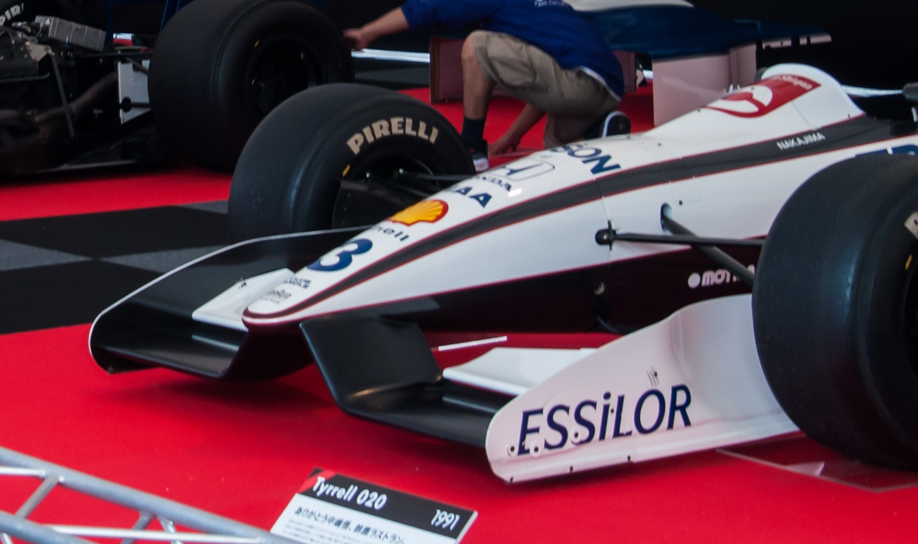 L'aileron avant de la Tyrrell 020, exposée en marge du Grand Prix du Japon 2013